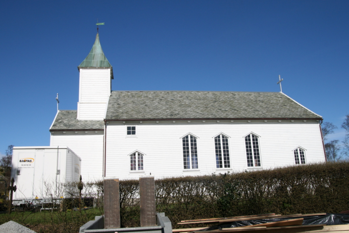 Hausken_kirke